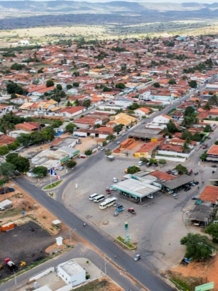 Vista aérea.